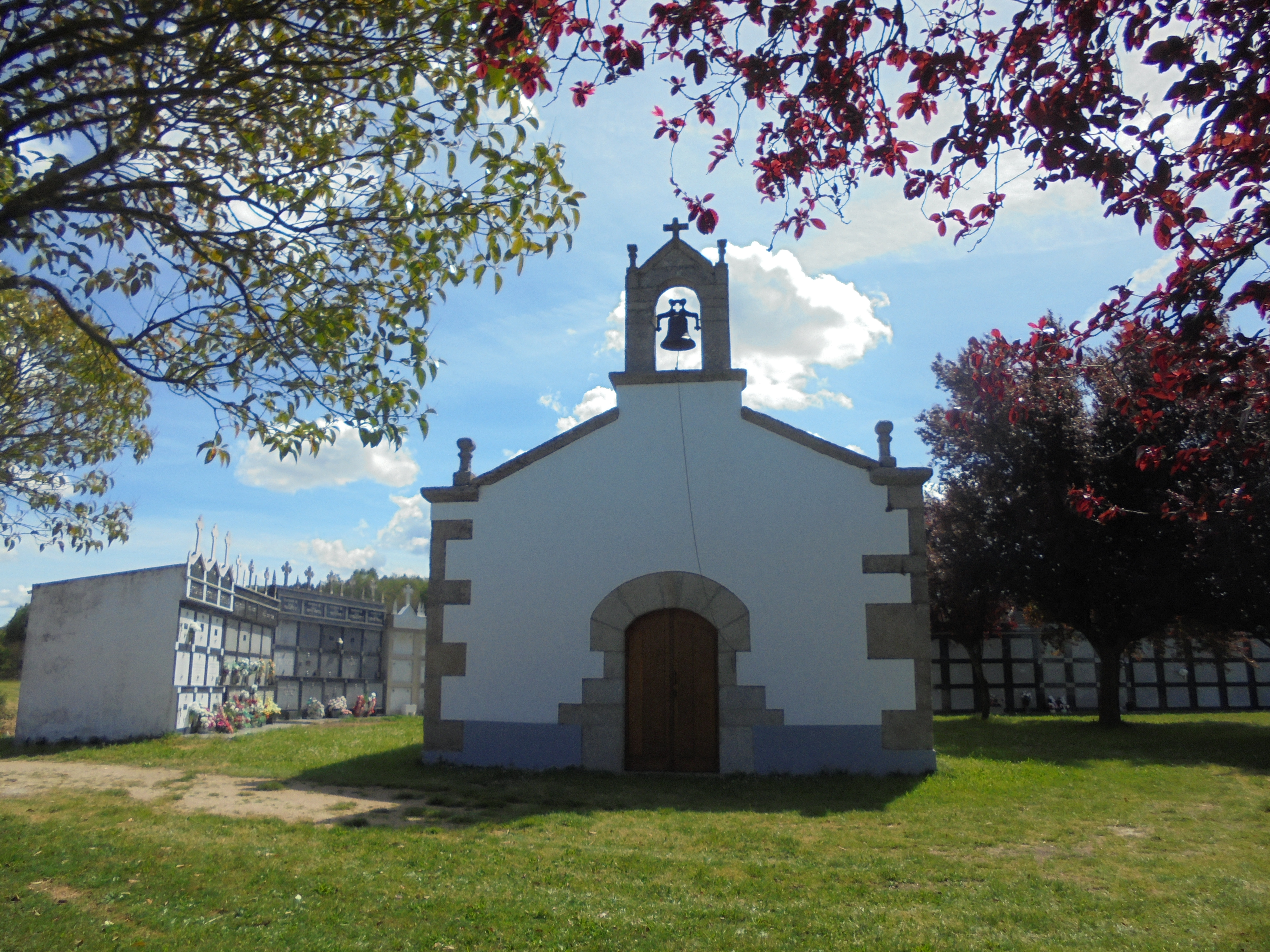 Igrexa parroquial de Mosteiro (Outeiro de Rei)